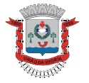 Brasão do Município de União da Vitória